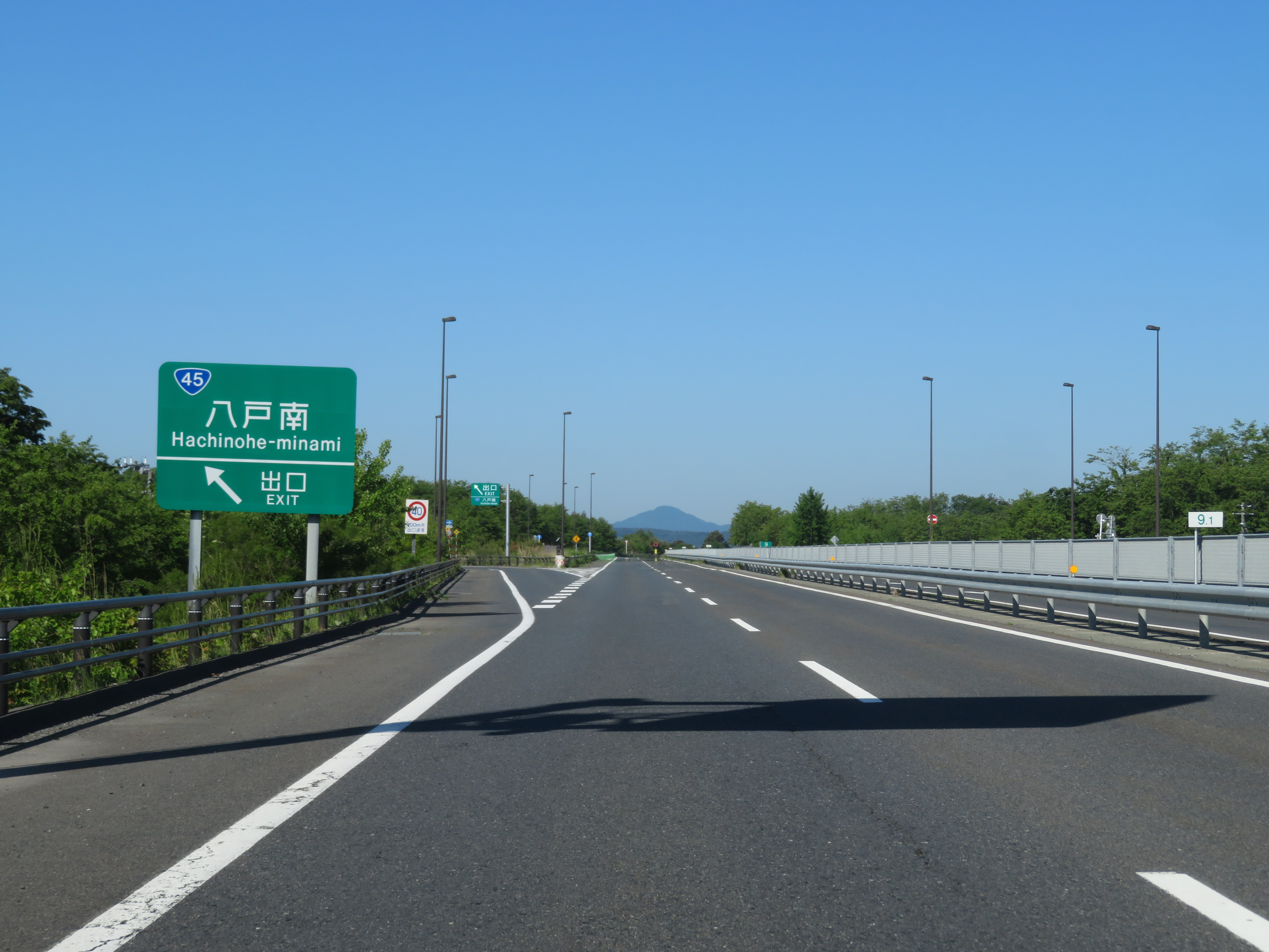 八戸久慈自動車道八戸南ＩＣ出口付近（久慈方面側から撮影） Canon PowerShot SX720 HS